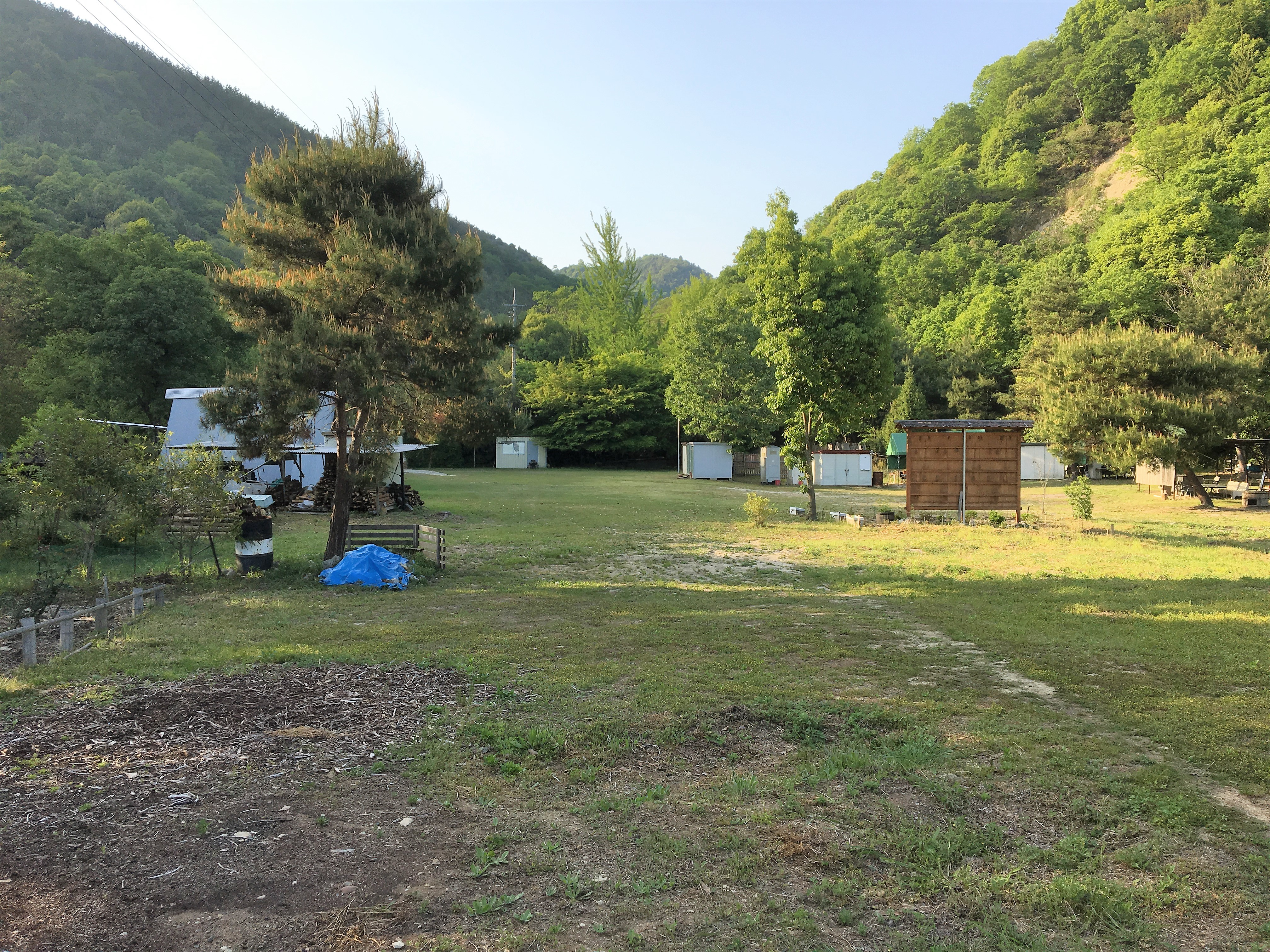 広島県福山市山手町の俄谷砂留群の第2番砂留の上流側の砂田溜まりに地元住民らによって作られた公園。